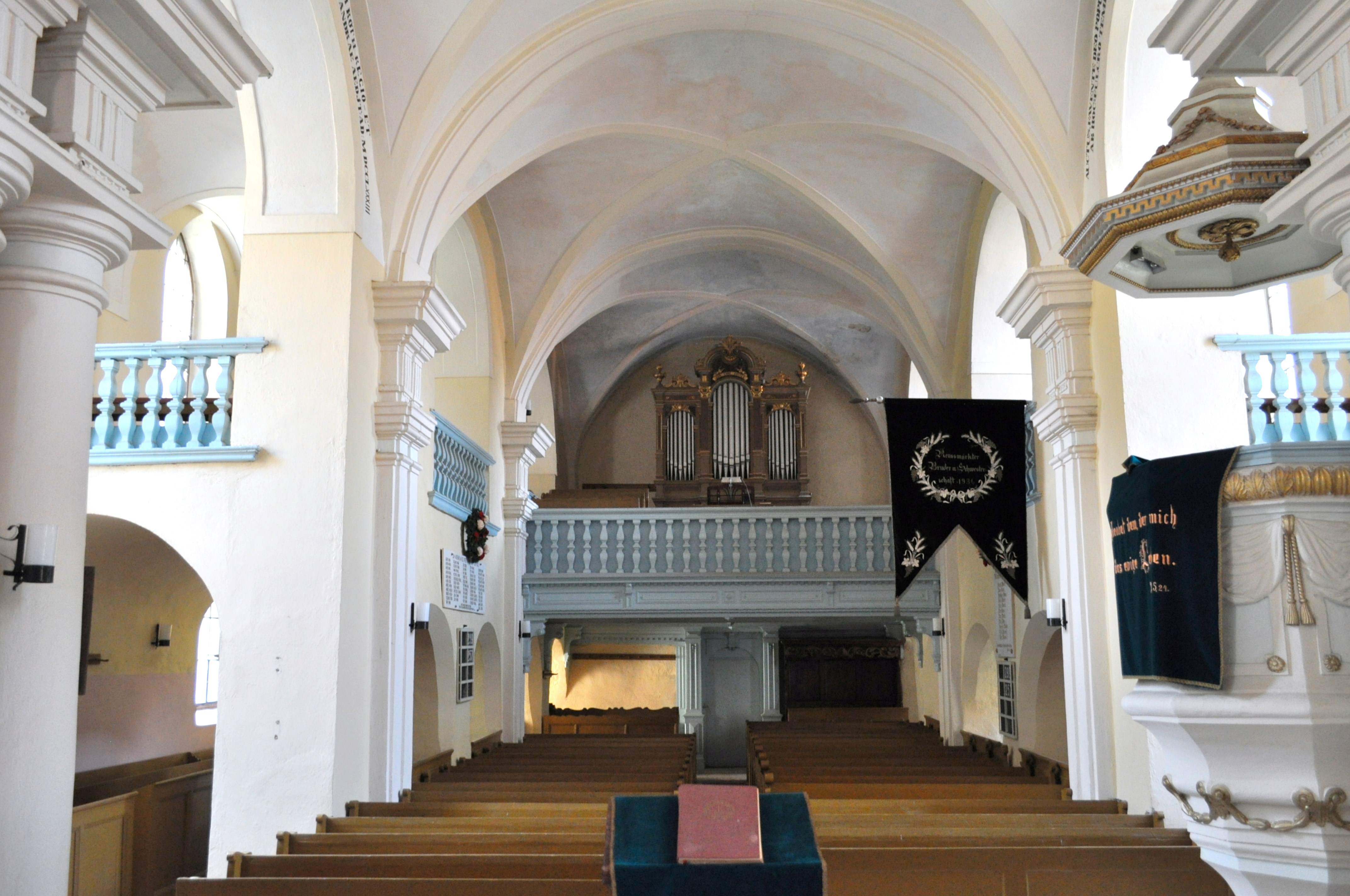 Biserica evanghelică, oraș Miercurea Sibiului, județul Sibiu 01